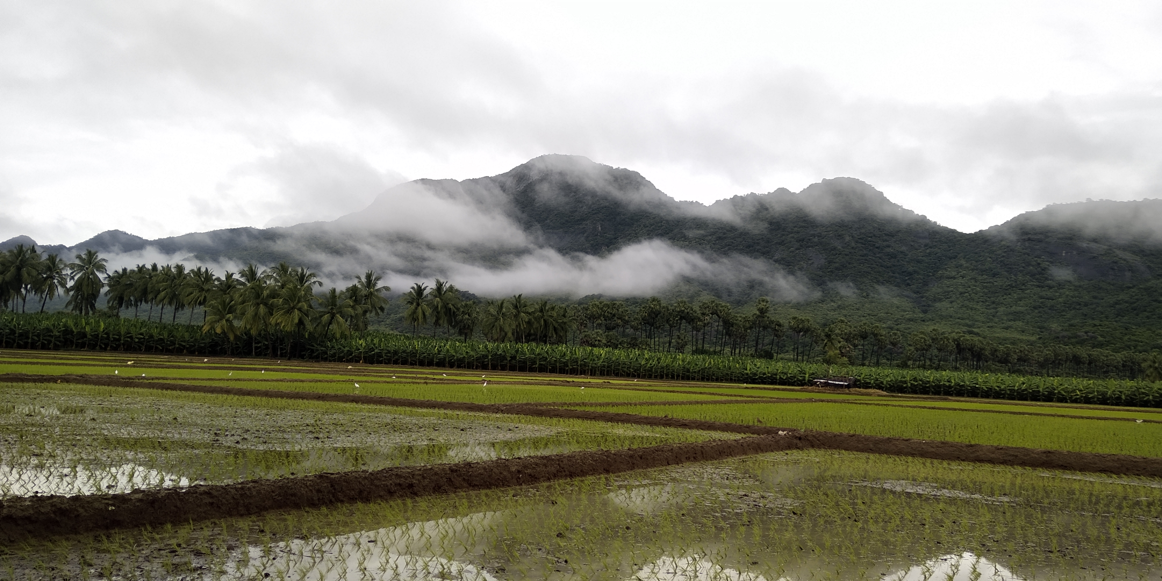 வயல் வெளிகளில் நெற்கதிர்கள்